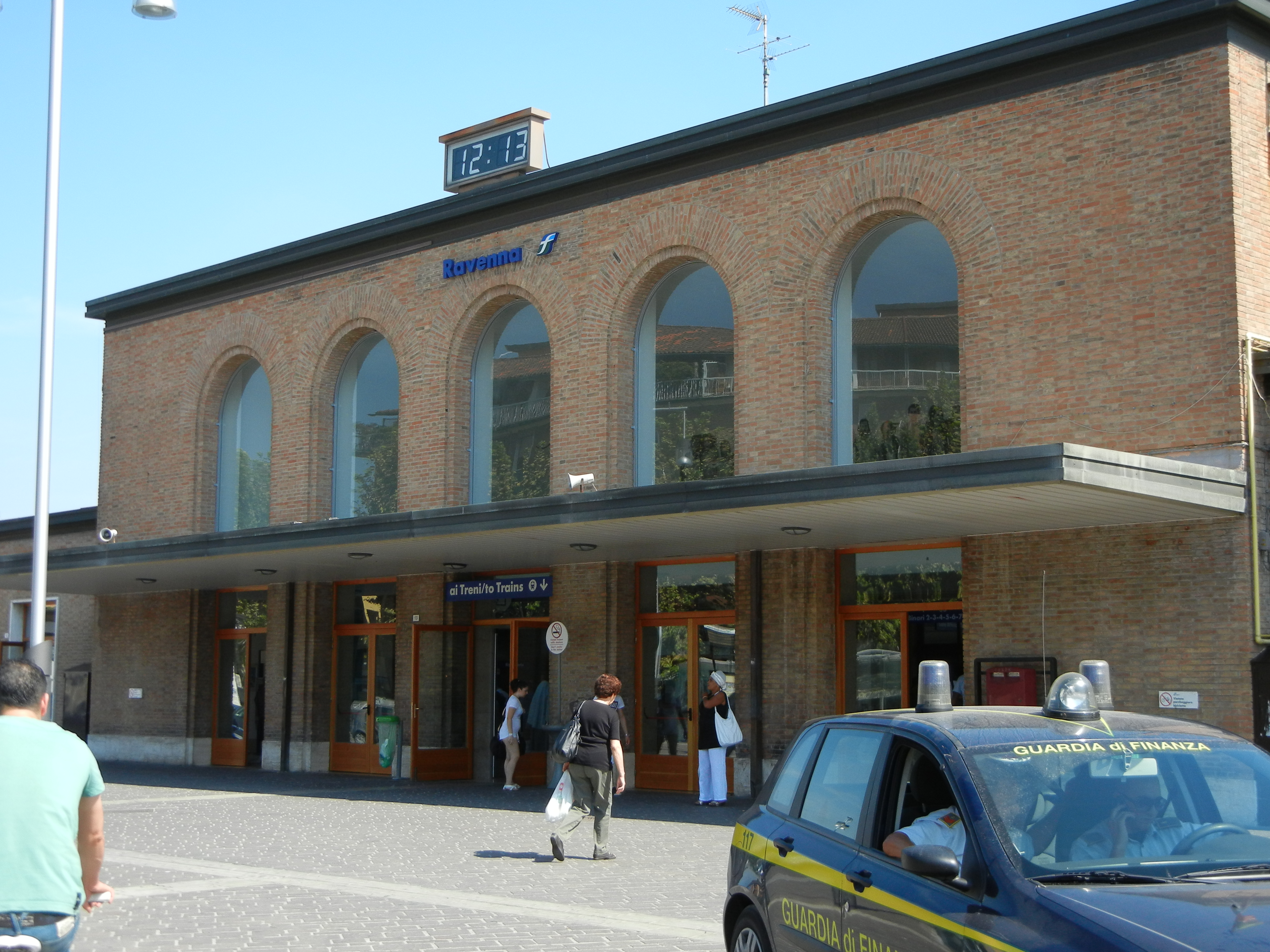 Stazione ferroviaria di Ravenna